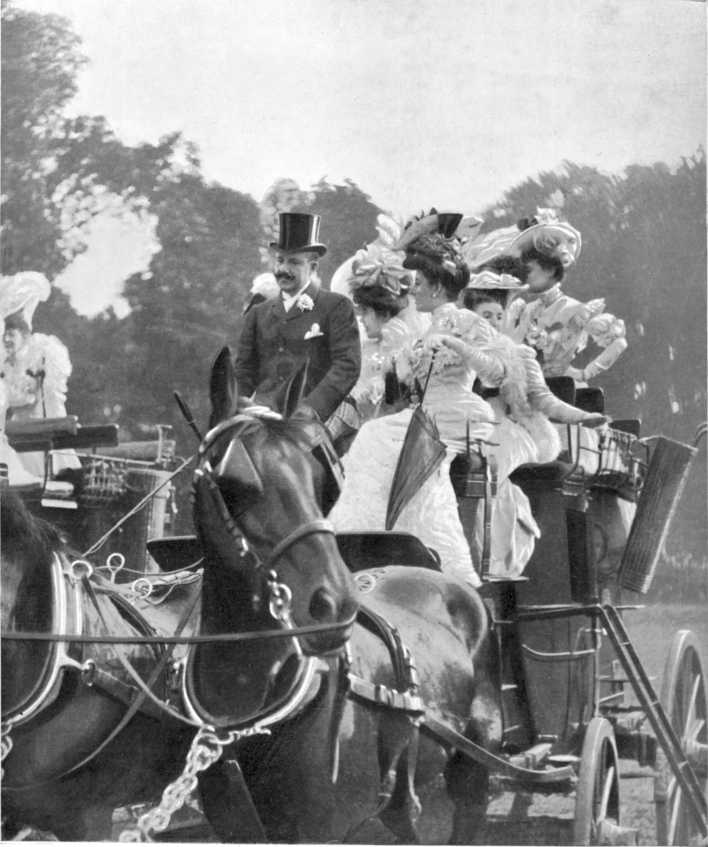 Le Mail Français On verra dans l'intérieur du numéro la tenue des mails américains pris à la dernière « parade ». Cette photographie prise à la réunion de la Société des Guides montre le mail français, garni d'élégantes Parisiennes et attelé et conduit avec une impeccable correction